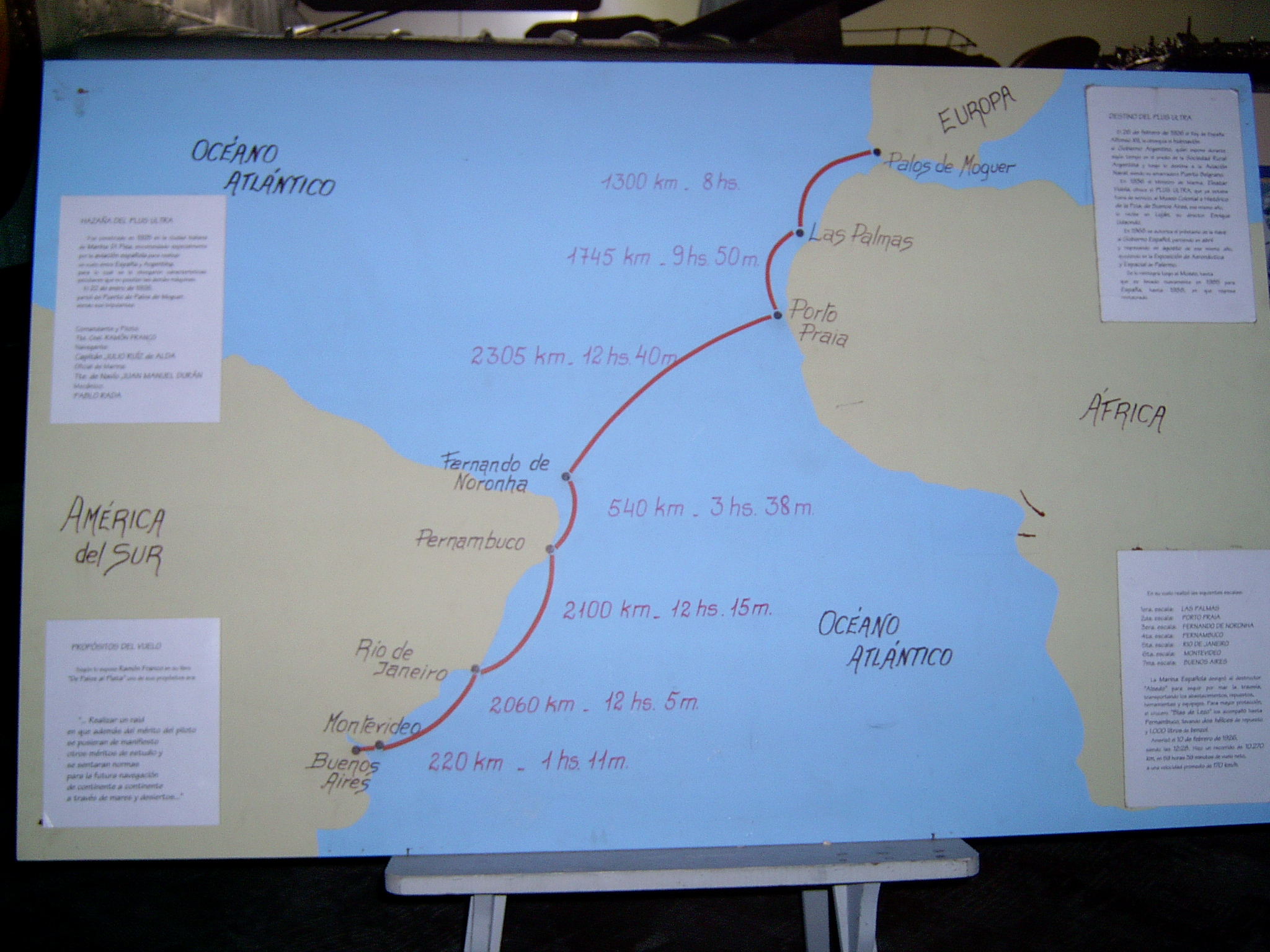 Autor: Jesus Manuel Cuartero Fotografía propia Croquis del vuelo del Plus Ultra Museo de Luján, Argentina